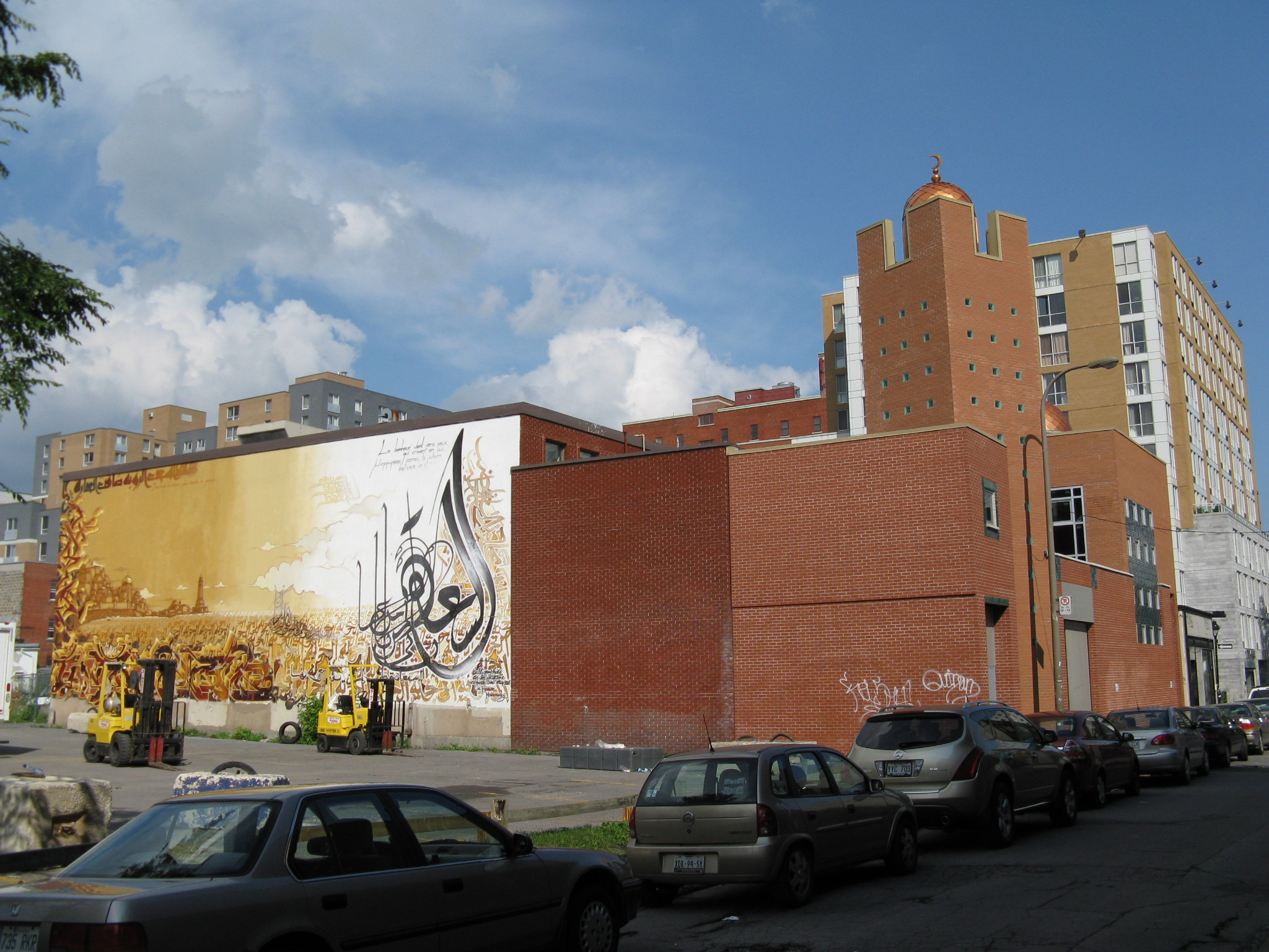 Mosquée Al-Omah Al-Islamiah . Al-Ummah Al-Islamiah Mosque . Masjid Al Oumma al Islamaya . Montreal .